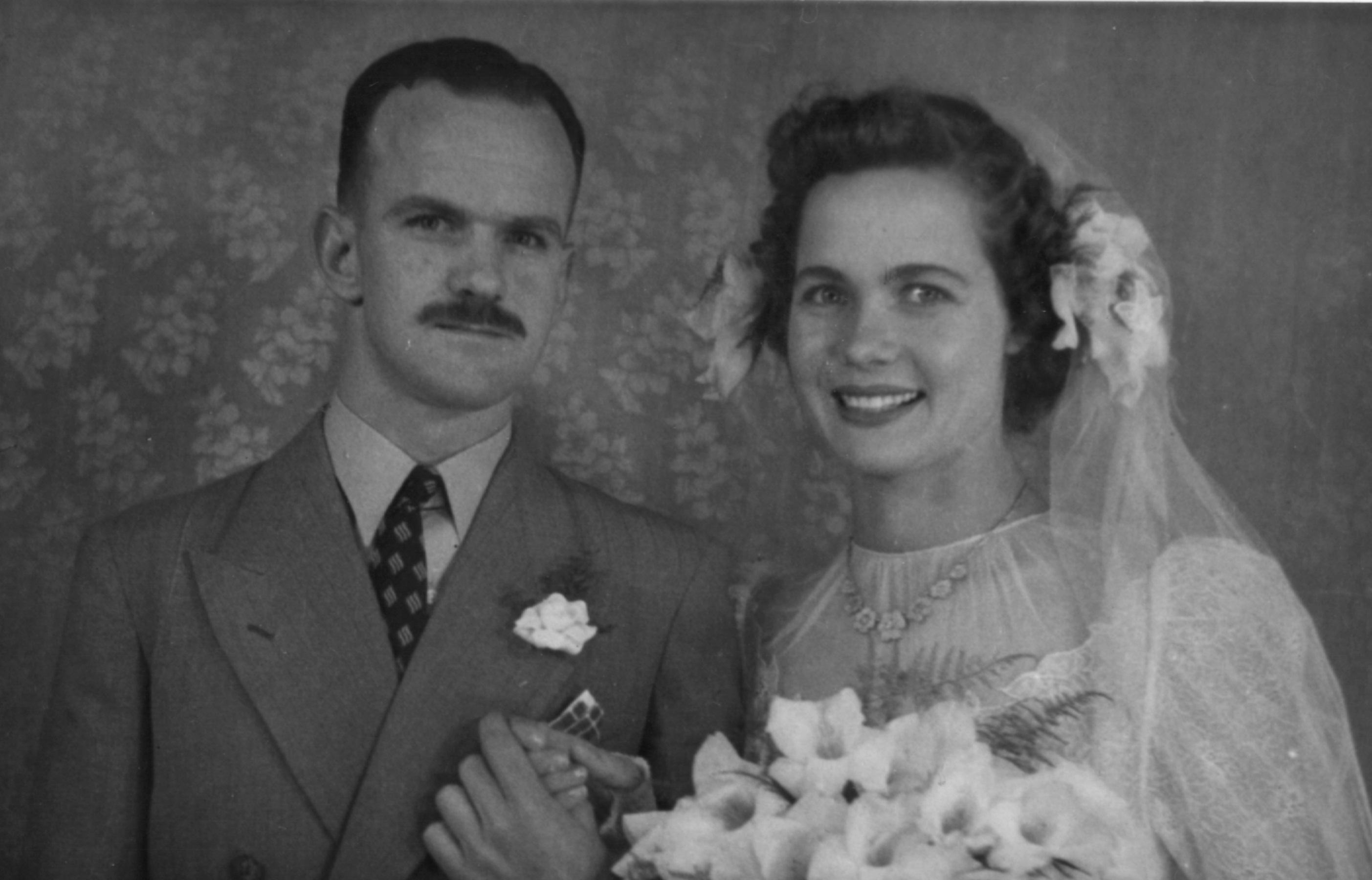 Troudag foto van Meiring en Annekie Theron